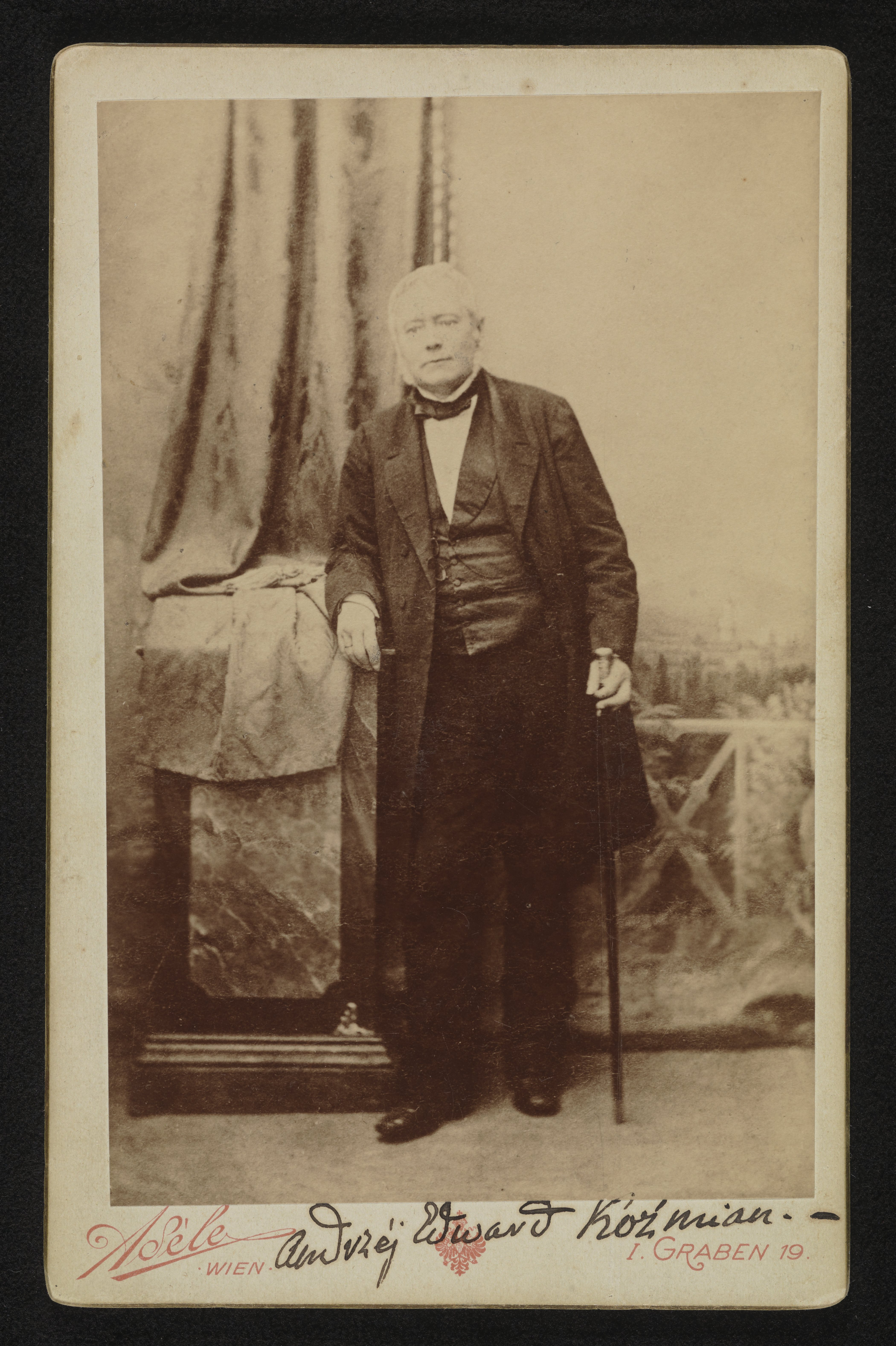 Andrzej Edward Koźmian, ok. 1860 r.